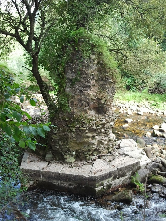 Restos de los antiguos contrafuertes del retén de troncos sobre el río Miera. Fueron utilizados para la Real Fábrica de Artillería de La Cavada.